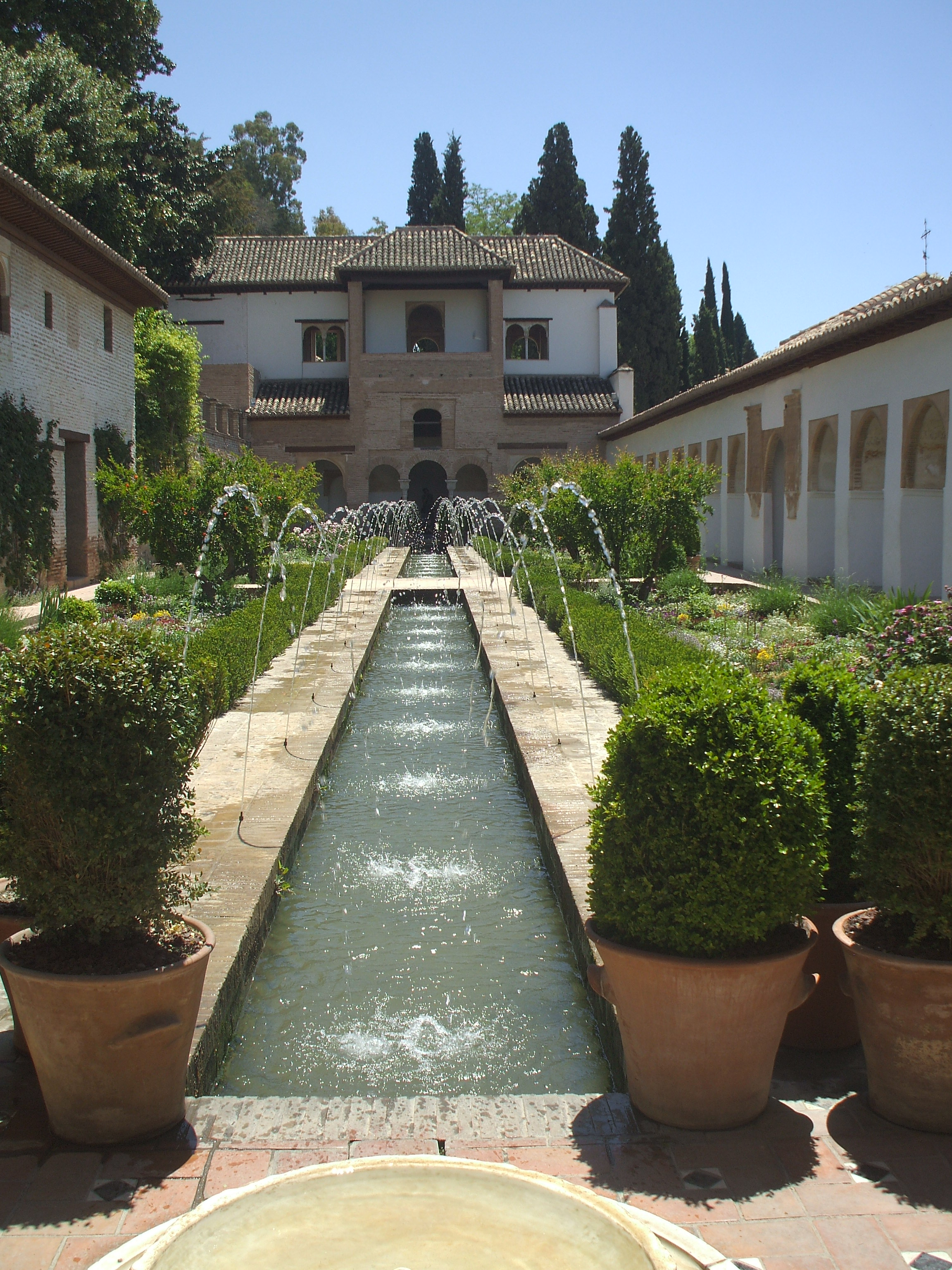 Una de las fuentes situada los jardines de la Alhambra (Granada, Andalucía, España). Alhambra Native nameAlhambraParent institutionAlhambra & the GeneralifeLocationGranada, (Spain)Coordinates37° 10′ 36.54″ N, 3° 35′ 23.52″ W EstablishedMiddle AgeWeb page control : Q47476 VIAF: 127461768 ULAN: 500306857 LCCN: sh86000112 BIC: RI-51-0010966 GND: 4093883-9 WorldCat institution QS:P195,Q47476